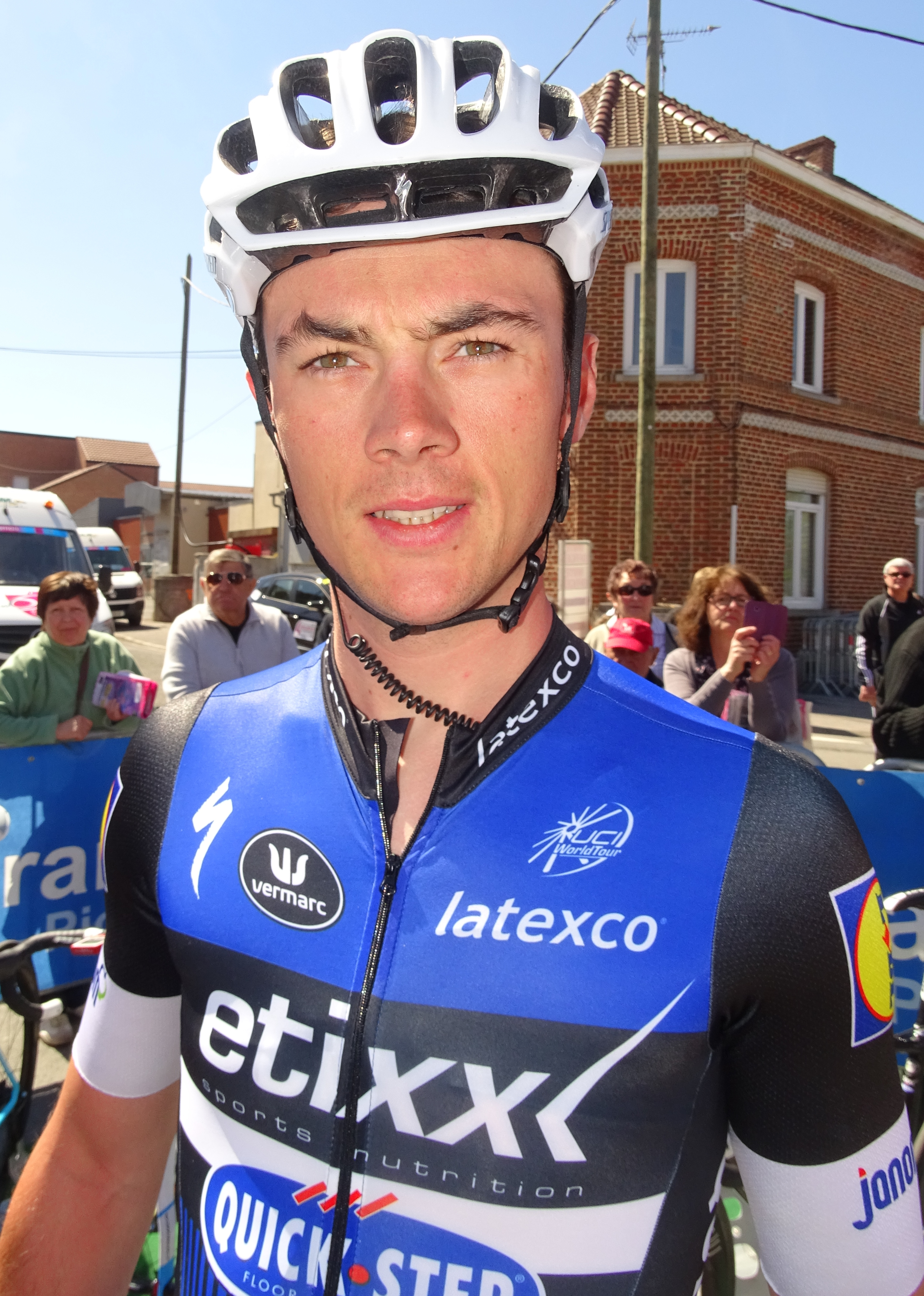 Reportage réalisé le jeudi 5 mai 2016 à l'occasion du départ et de l'arrivée de la deuxième étape des Quatre jours de Dunkerque 2016 à Aniche, Nord, Nord-Pas-de-Calais, France.